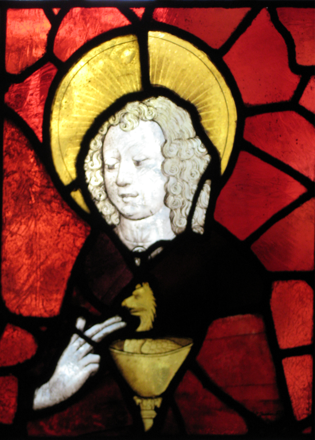 gotisches Bleiglasfenster Lukaskirche Das Bleiglasfenster eines unbekannten Meisters befindet sich in der Sakristei der Lukaskirche (Frankfurt am Main) und stellt den Apostel Johannes dar. Das Fenster wurde 1953 zum Andenken an Dr. Georg Kalischer von dessen Ehefrau gestiftet (Einbau und Restauration: Fa. Derix). vgl. Diskussion auf WP:UF